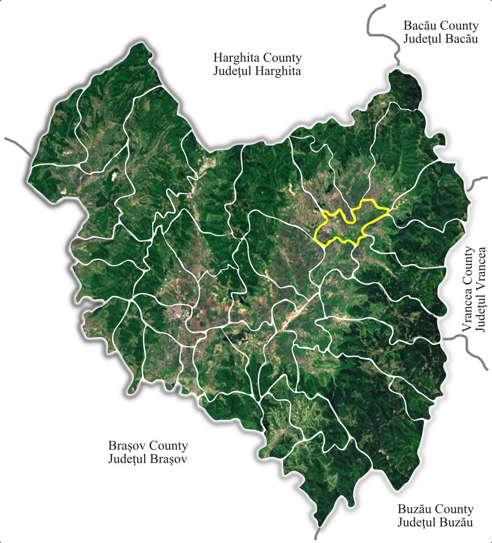 Targu Secuiesc jud Covasna